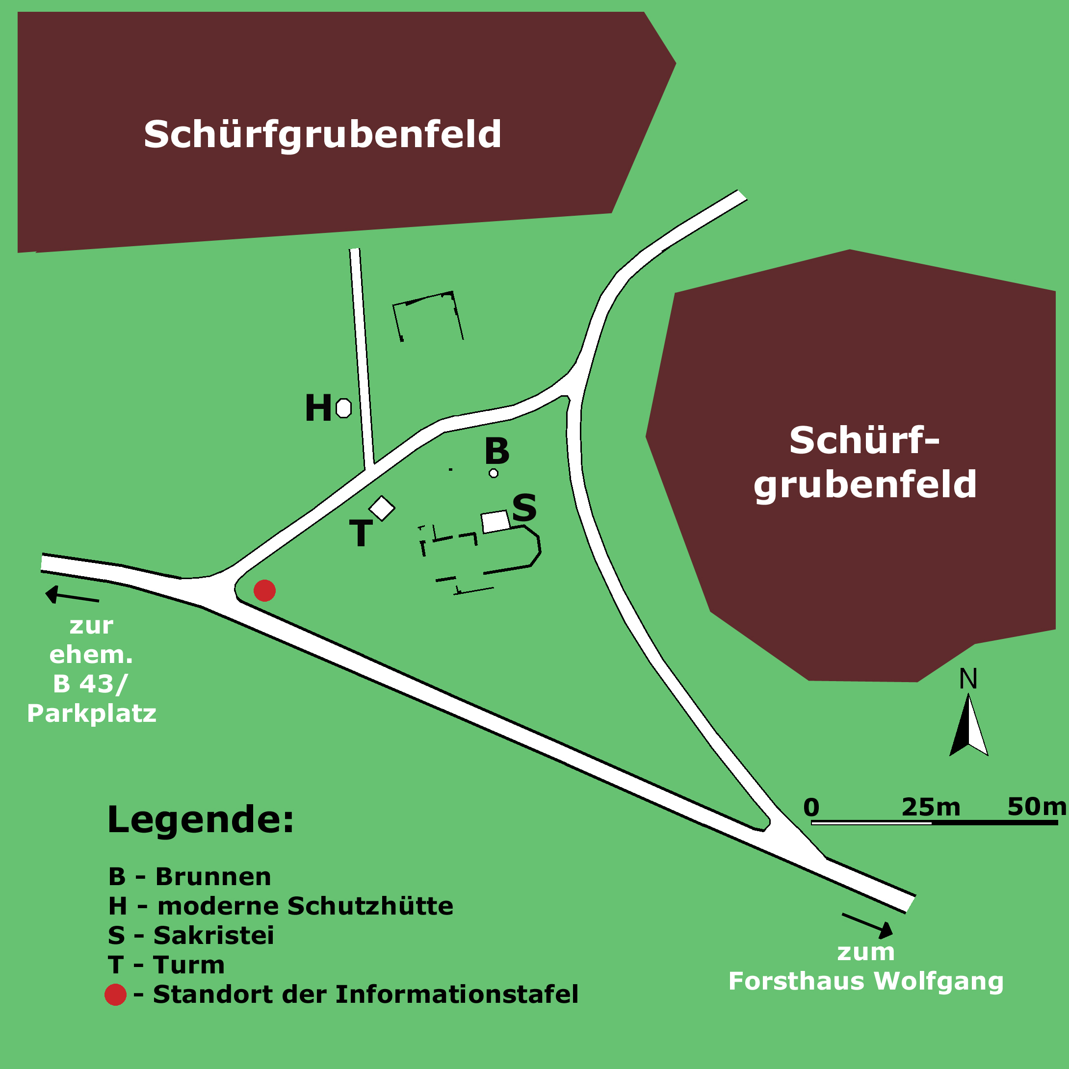 Grundrissplan der Klosterruine St. Wolfgang bei Hanau, Hessen